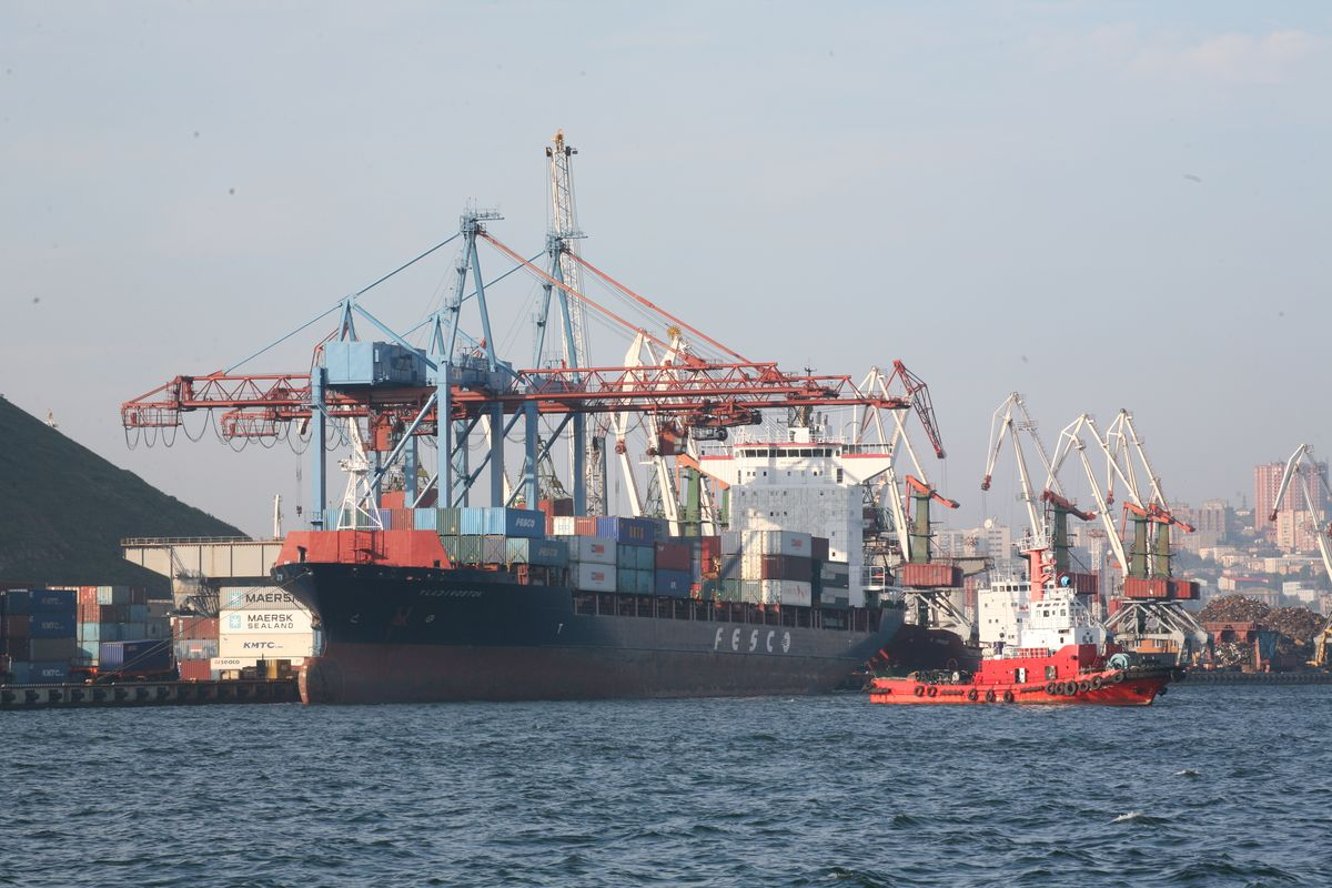 Владивостокский контейнерный терминал